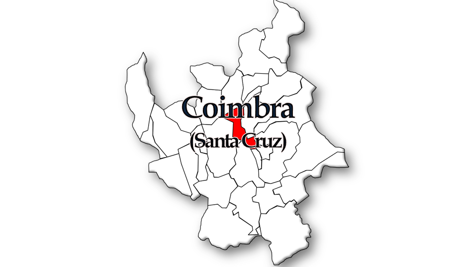 População